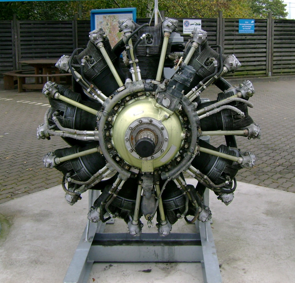 Schwezow Neunzylinder-Sternmotor einer Antonov An-2